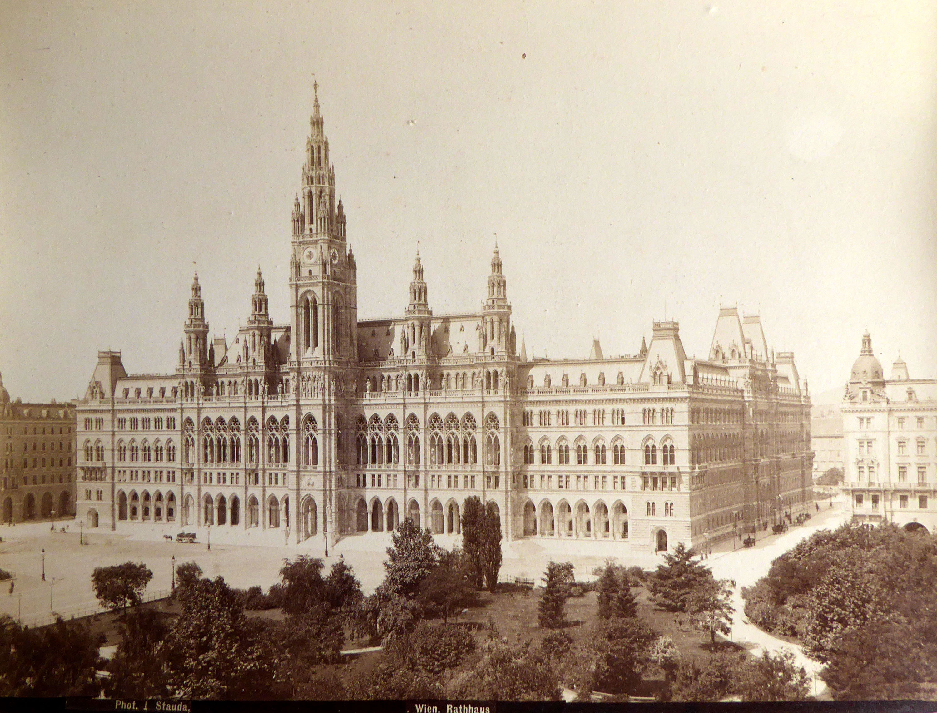 Wiener Rathaus